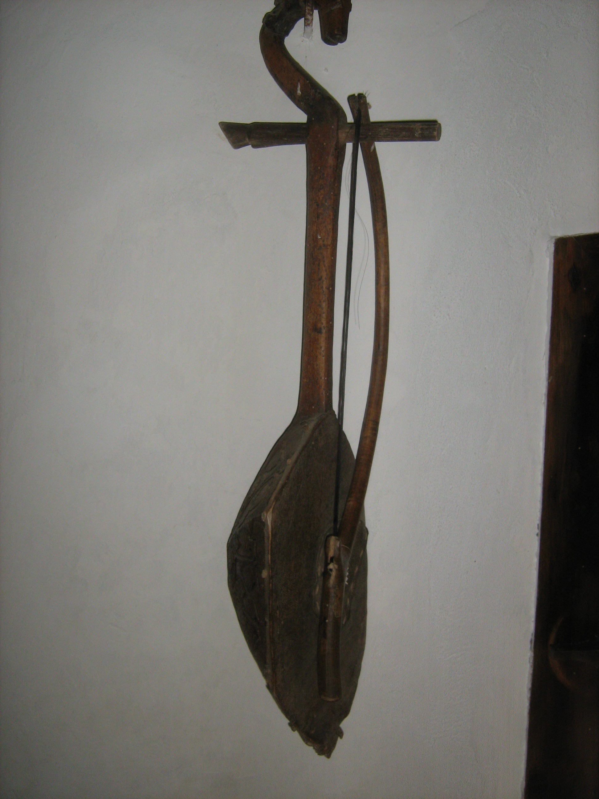 Гусле у Вуковој кући